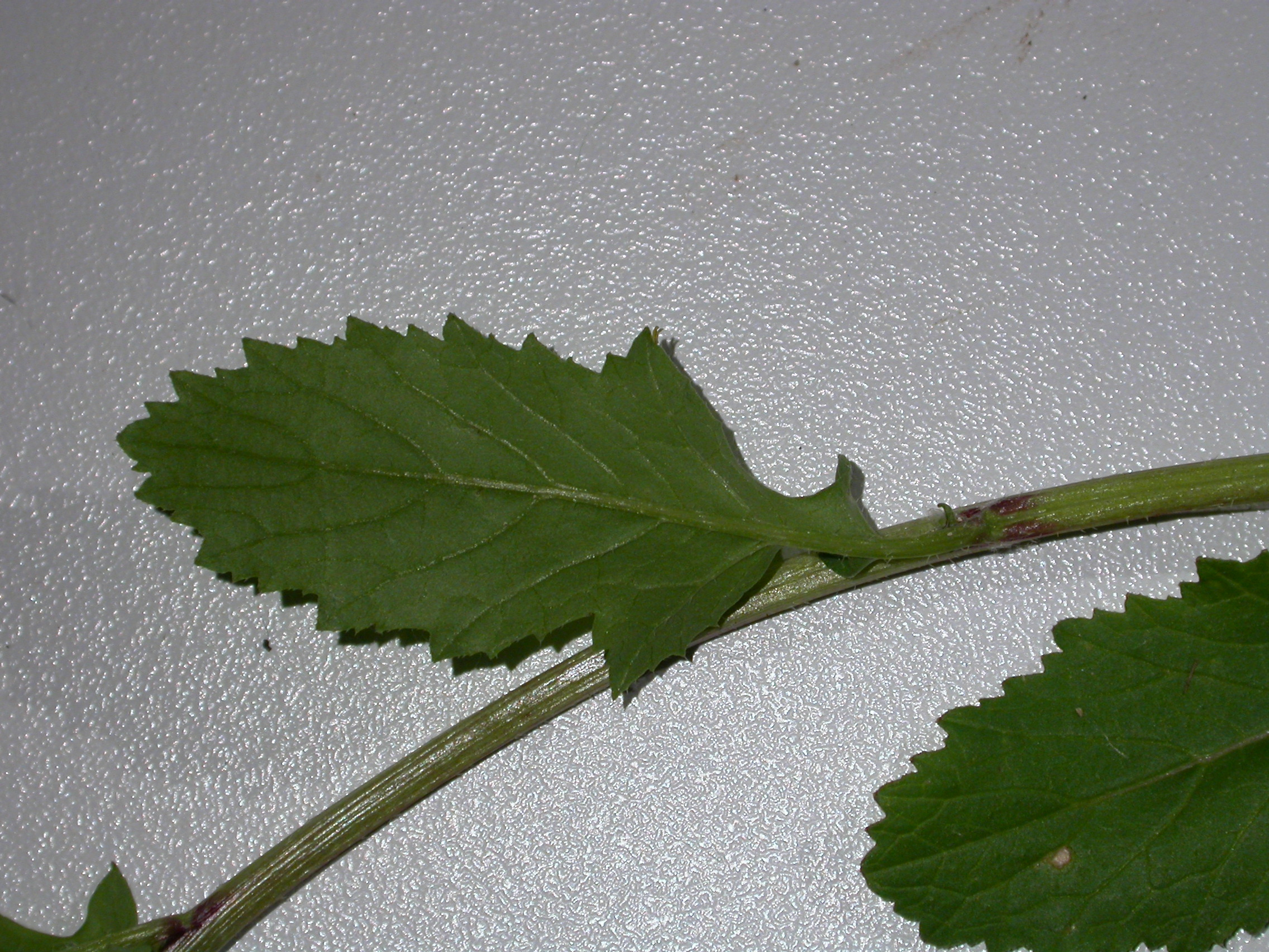 Sinapis arvensis Pont en aval de Revigny-sur-Ornain (Meuse), France